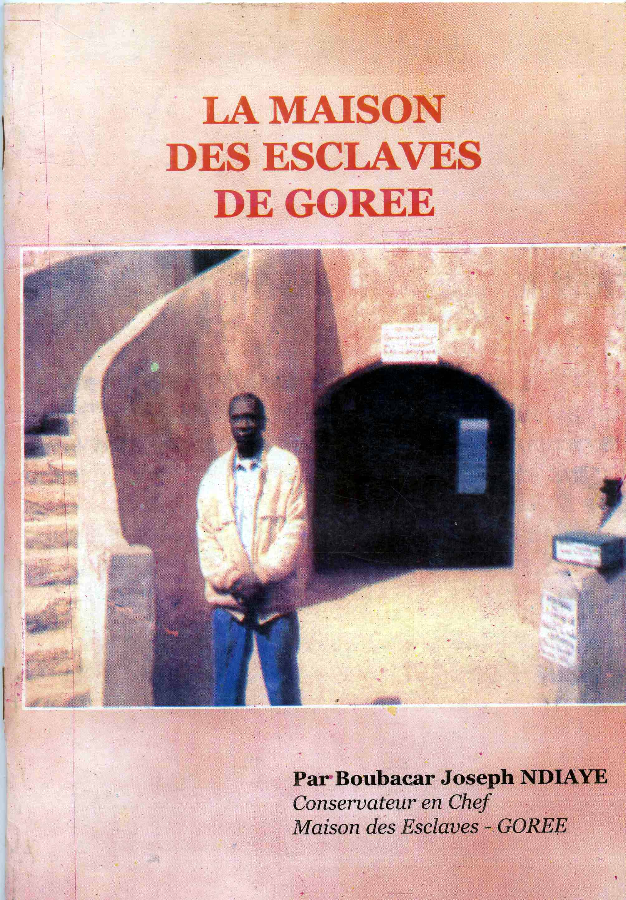 Couverture scannée de la plaquette "La Maison des esclaves" de Boubacar Joseph Ndiaye